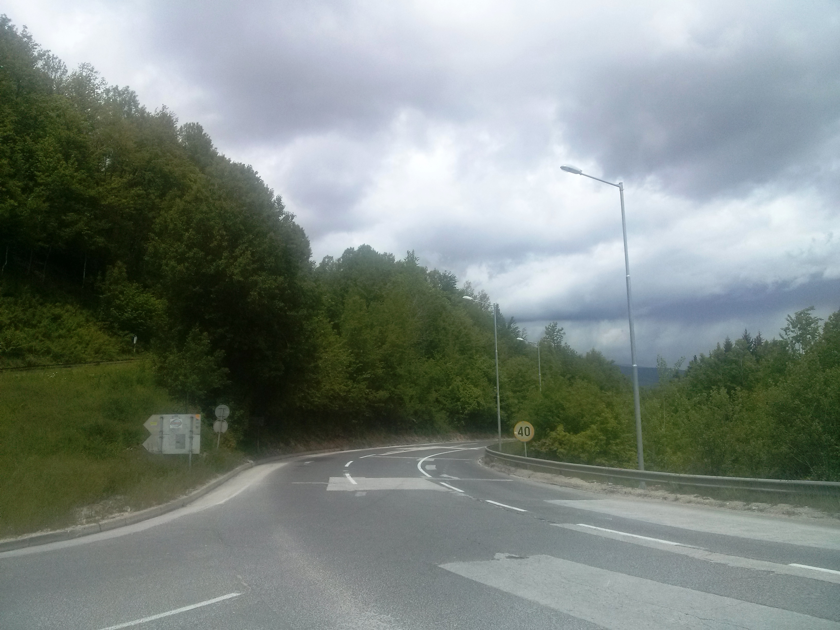 Почетокот на патот на „Националниот парк Маврово“